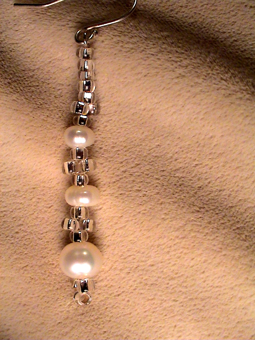 jewelry set